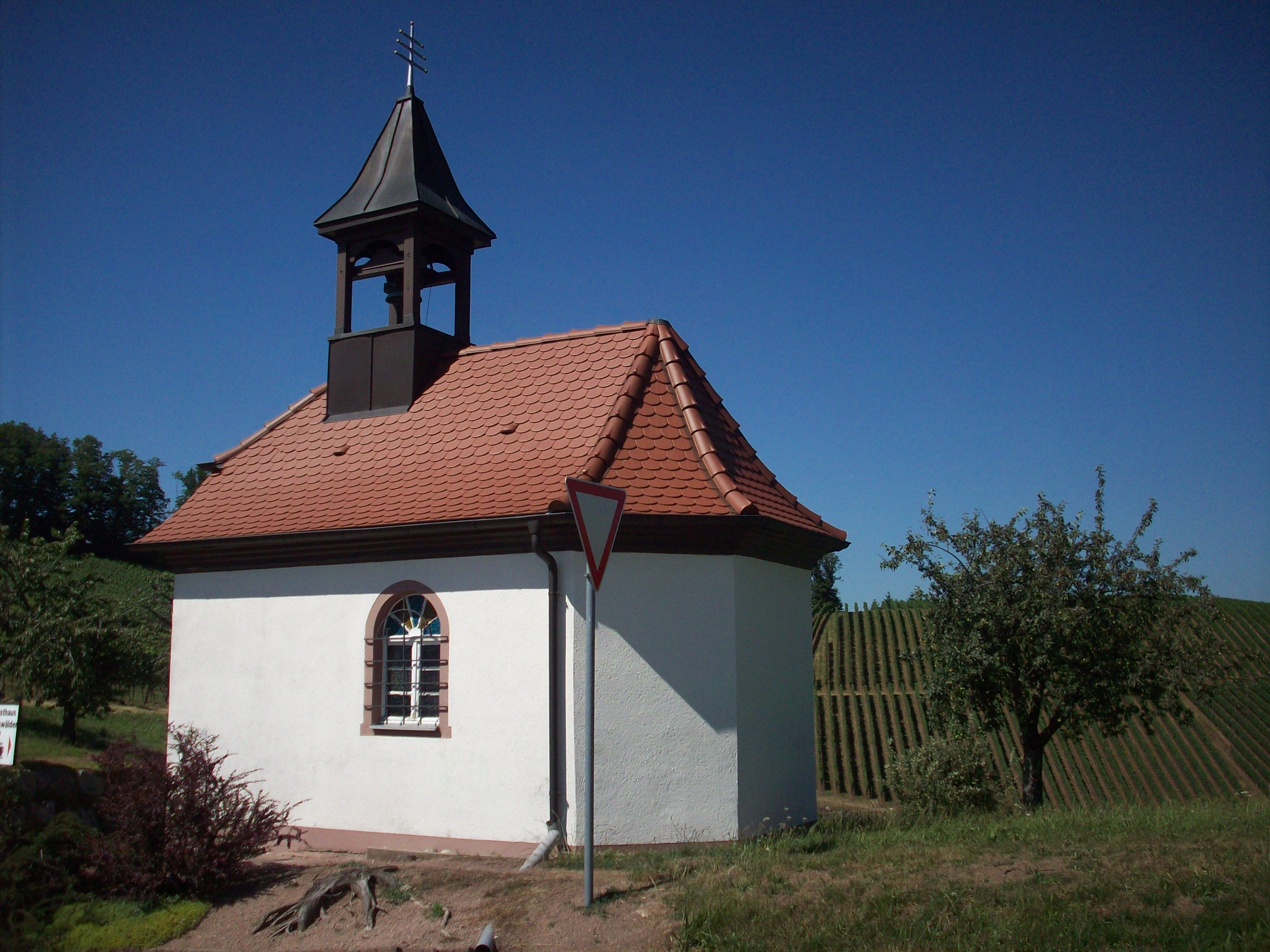 Chapelle de Bottenau.